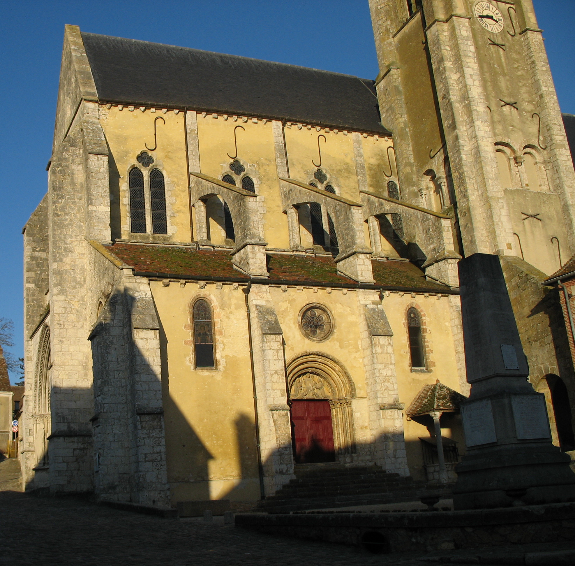 Église de Donnemarie.